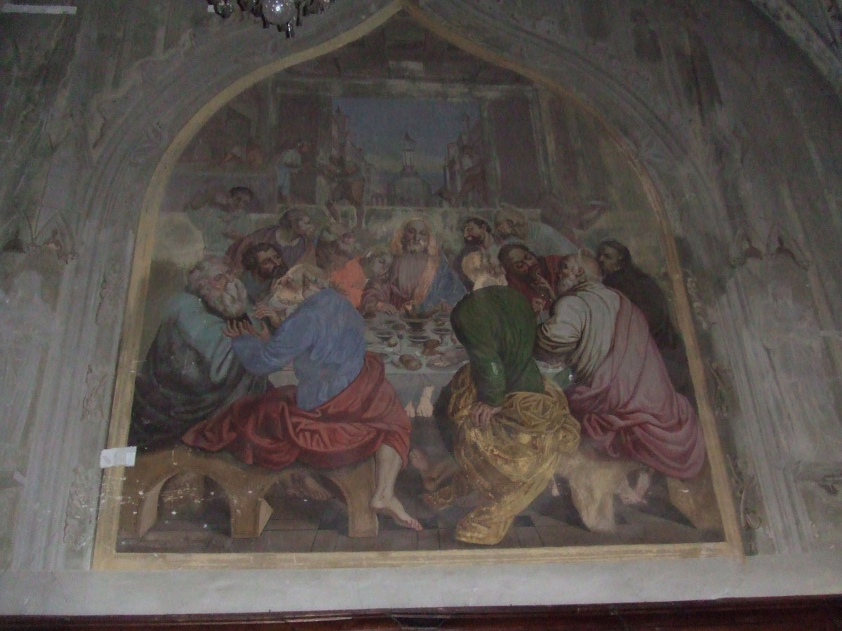 Fresque de la Cène des frères A&G Avondo - Pont de Beauvoisin (Savoie) - France